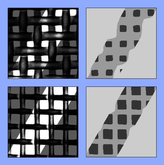 Gewebegeometrie und Druckergebnis